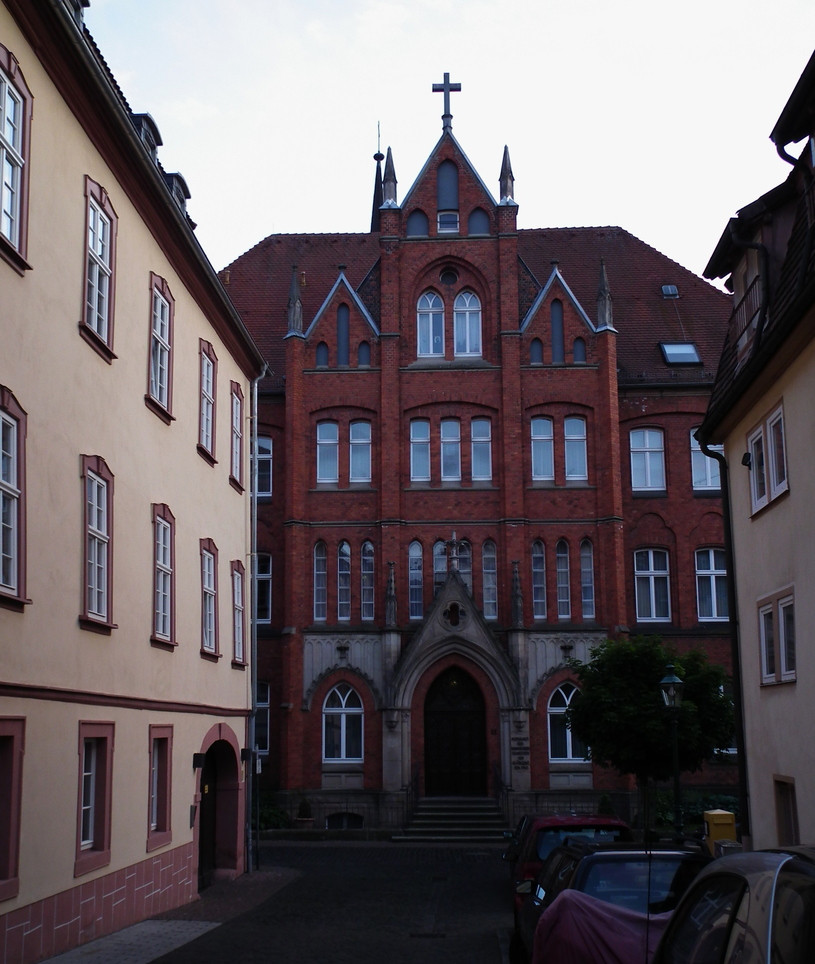 Mutterhaus der Barmherzigen Schwestern vom Heiligen Vincenz von Paul in Fulda (Hessen, Deutschland)